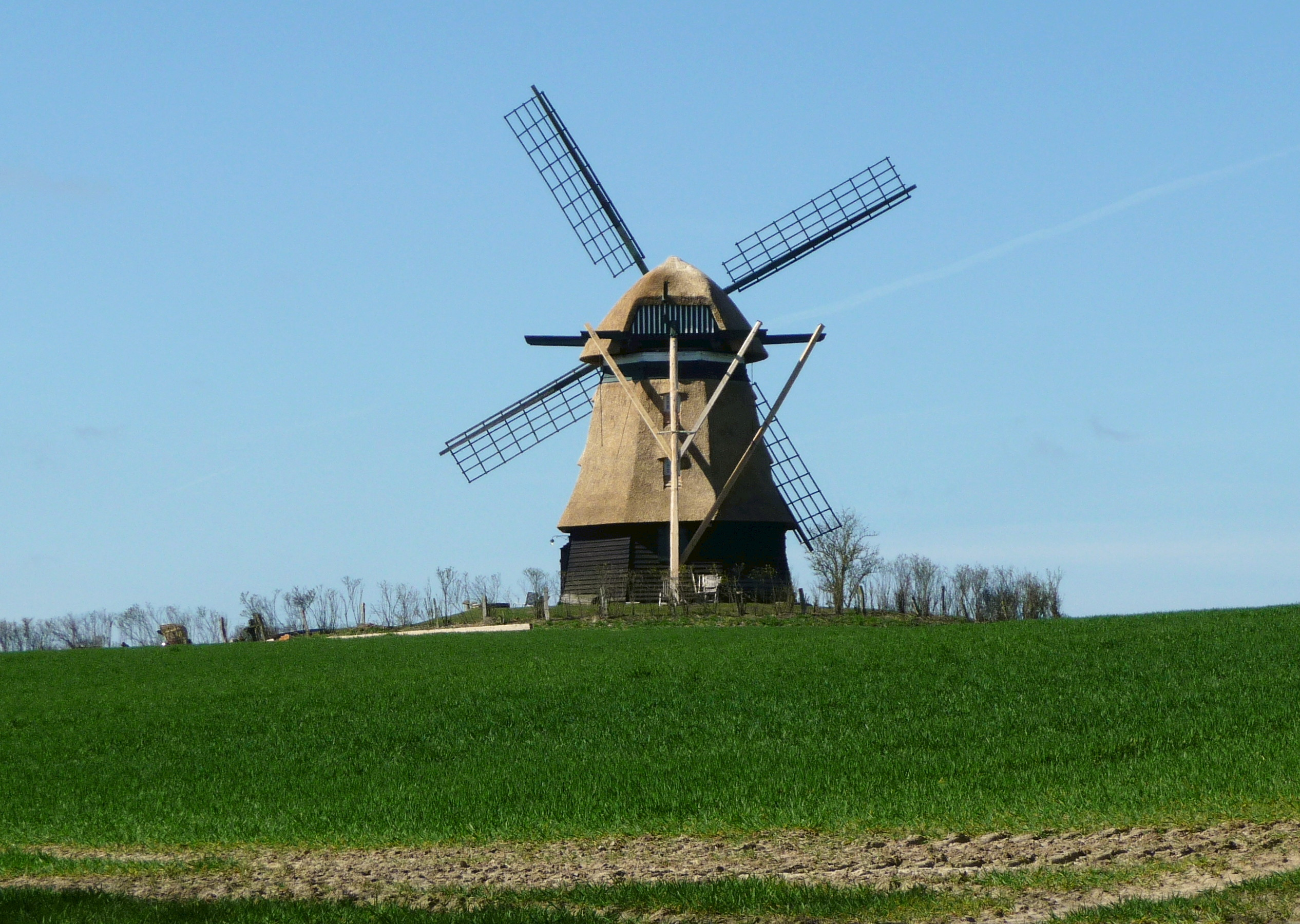 Farver Mühle nach Renovierung; Blick auf die Rückseite mit dem Steert